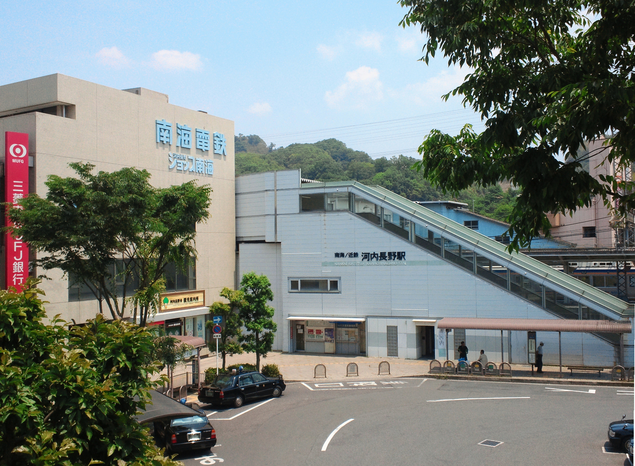 河内長野駅舎